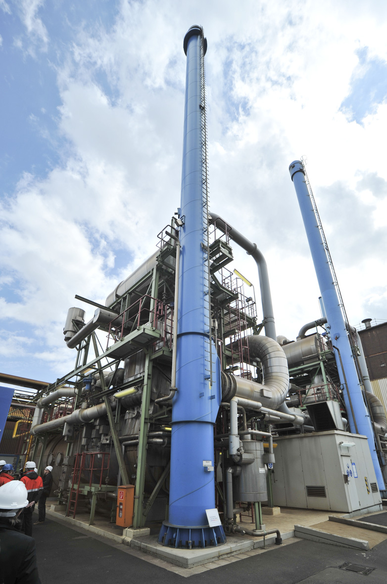 Klimaschutz bei Lanxess in Krefeld NRW-Klimaschutzminister Johannes Remmel informierte sich auf der 16. Etappe der Klimaschutztour beim Spezialchemie-Konzern LANXESS in Krefeld über dessen Klimaschutz-Strategie. Klimaschädliches Lachgas wird dort vollständig neutralisiert. Flickr tags: Klimaschutztour; 2012; NRW; EANRW; Minister; Johannes Remmel; Lanxess; Krefeld; Klimaschutz; EnergieAgenturNRW